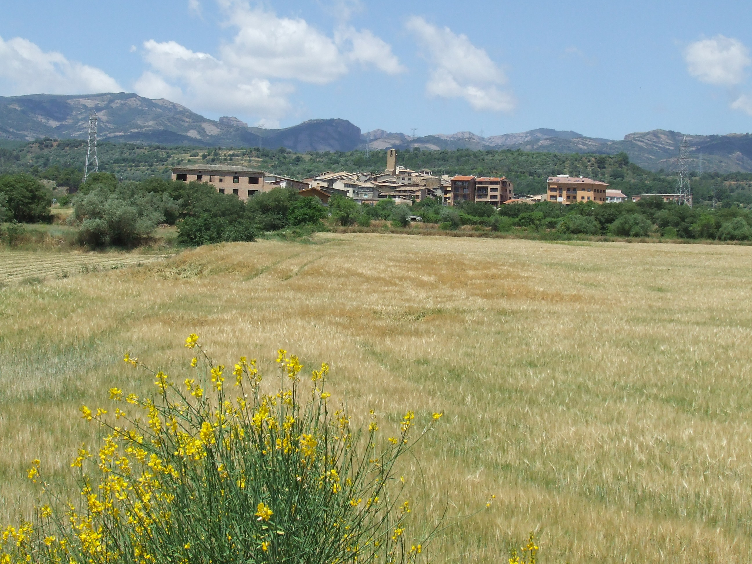 La vila de Salàs de Pallars des de llevant (Pallars Jussà)